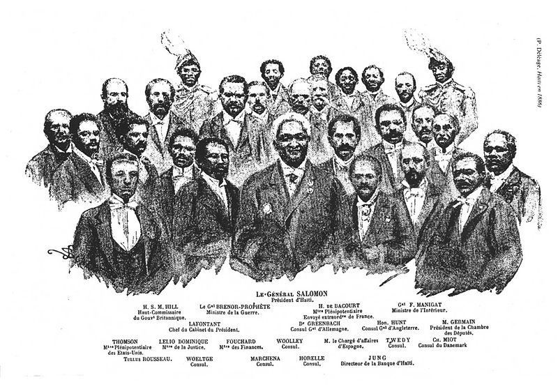 Ministres et ambassadeurs entourant le Président d'Haïti Lysius Salomon